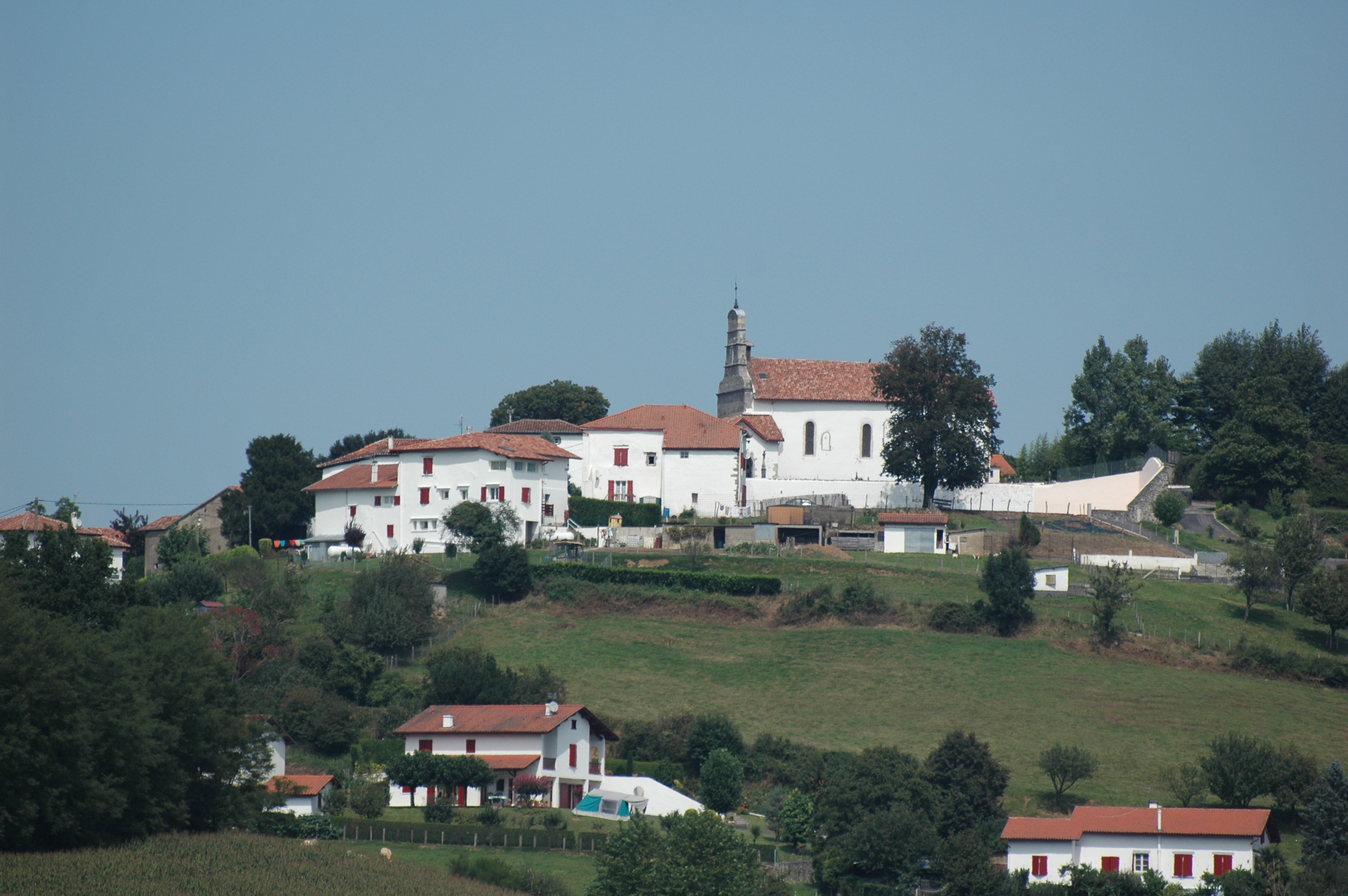 Mendionde, quatier Gréciette, l'église du XVème siècle